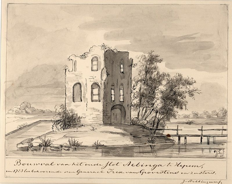 Bouwval van het oude slot Aebinga te Hijum, in 1723 toebehorende aan Generaal Fred van Grovestins en zusters.